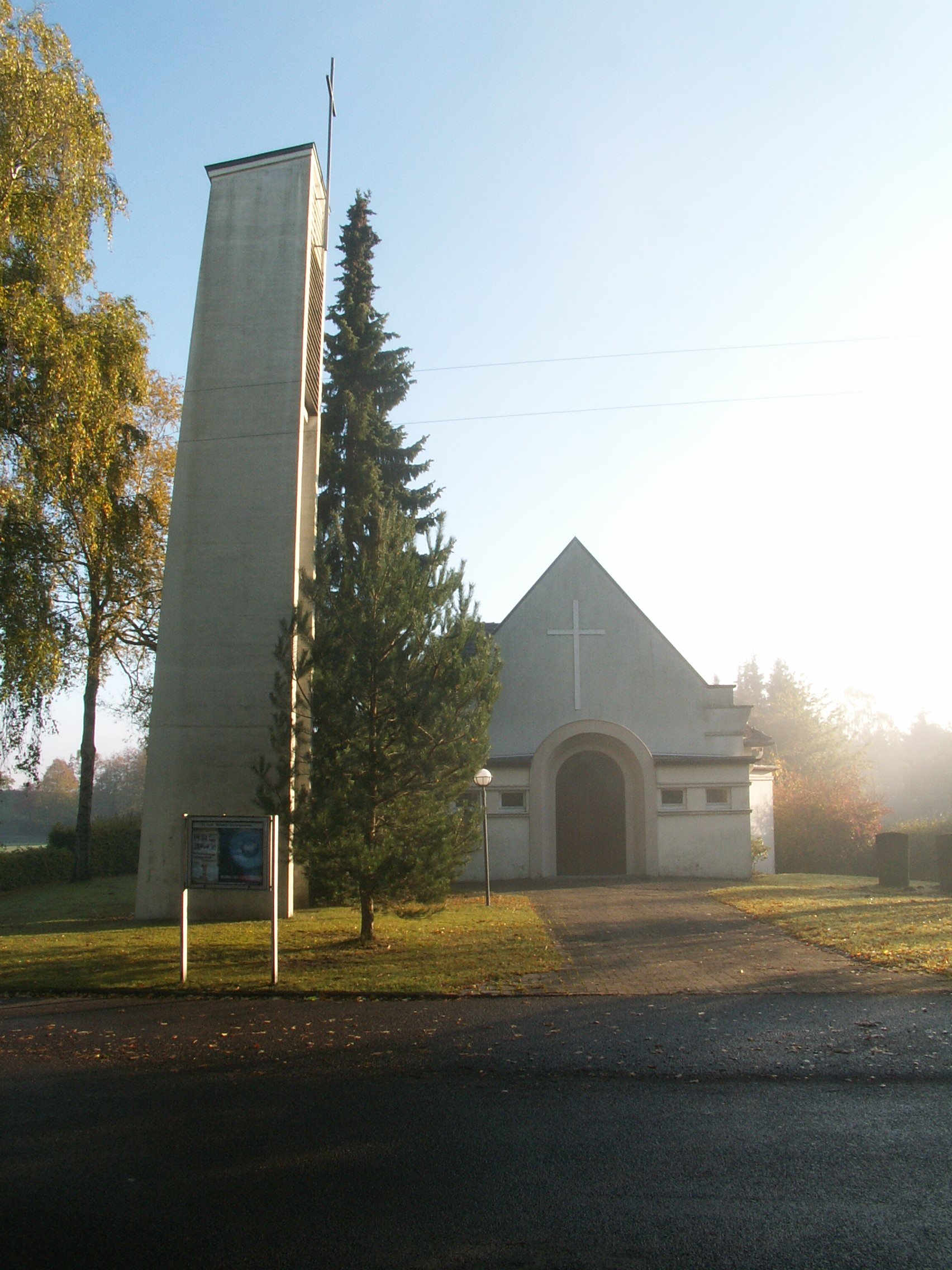 Trinitatiskirche in Falkendiek, Stadt Herford, Gesamtansicht mit Turm von Westen